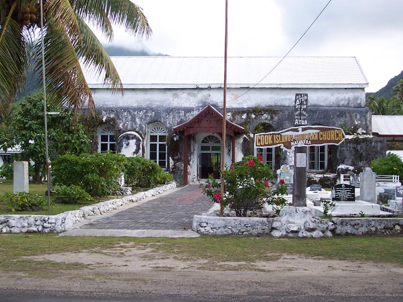 A Christian Church in Rarotonga. Taken by my parents. Released under GFDL.